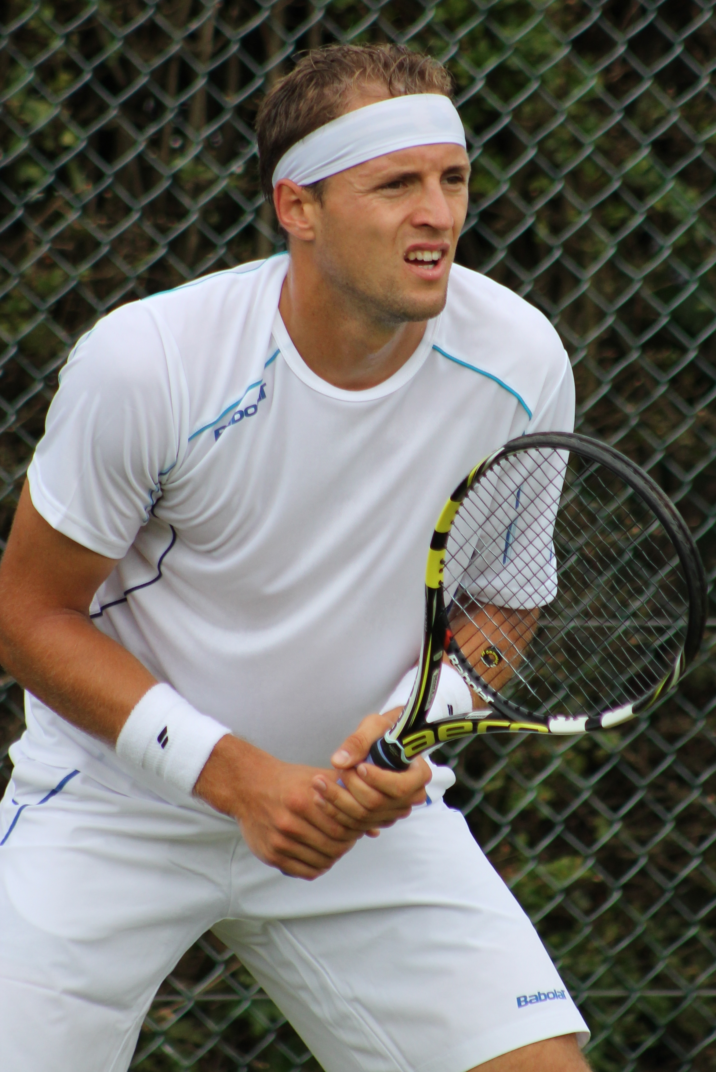 Ignatik WMQ14 (8)